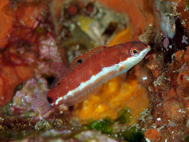 ハコベラ Thalassoma quinquevittatum